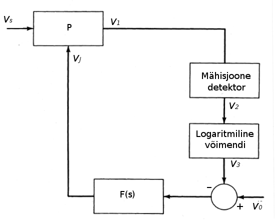 AVR mudeli plokkskeem